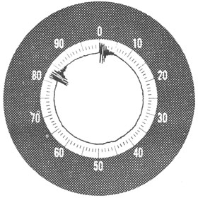 Электронно-лучевой индикатор эхолота UQN-1. При отсутствии зондирующих импульсов развёртка идёт по кругу (внутренний круг внутри шкалы). В момент посылки зондирующего импульса на развёртке в районе нулевой отметки шкалы появляется характерный всплеск в виде затухающей синусоиды. В момент прихода эхо-сигнала такая же отметка появляется в той части развёртки, которая соответствует глубине акватории. На данном рисунке глубина составляет 82 фута или 82 морские сажени, в зависимости от того, в каком режиме работает индикатор.